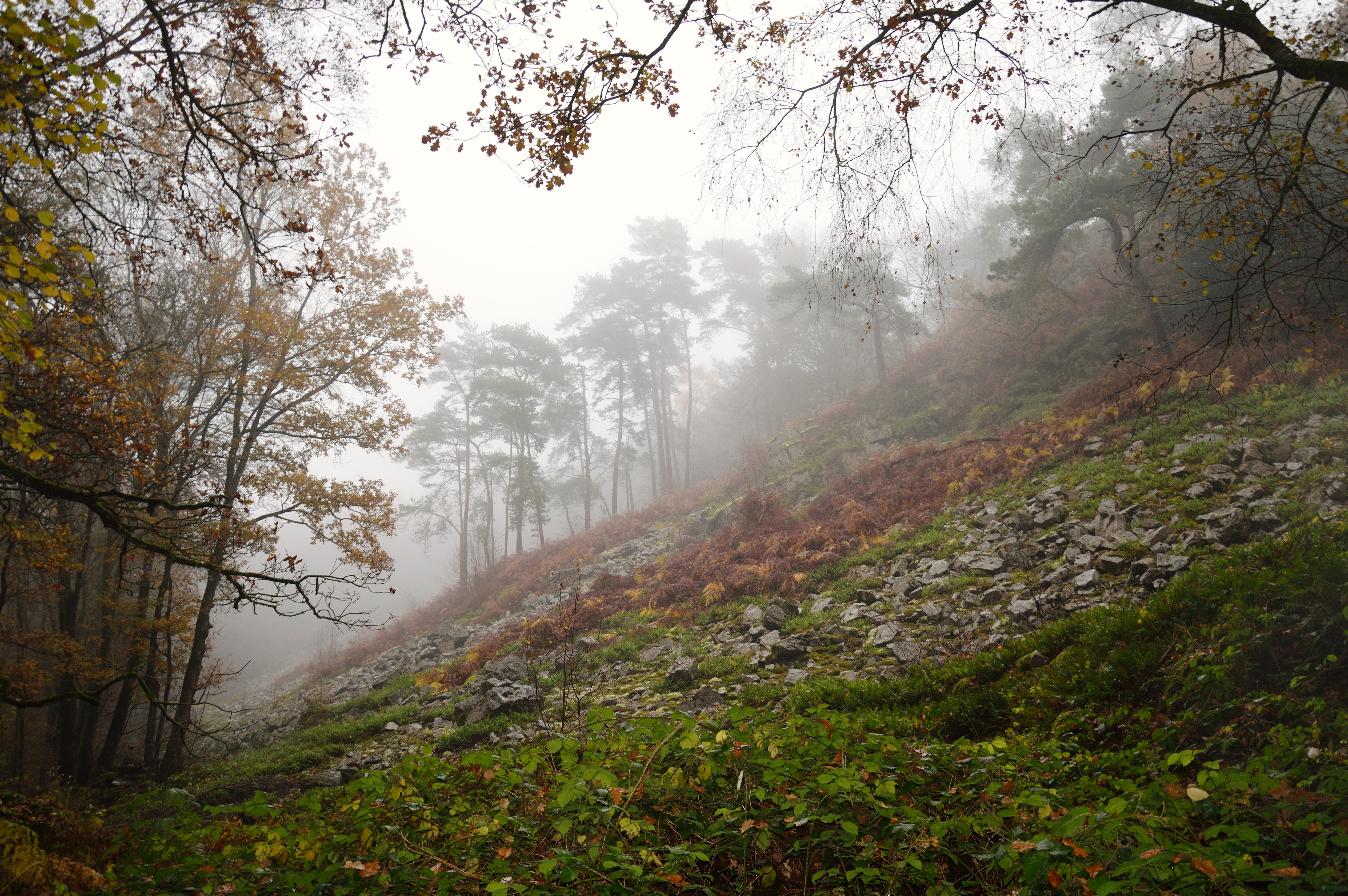 Pierrier